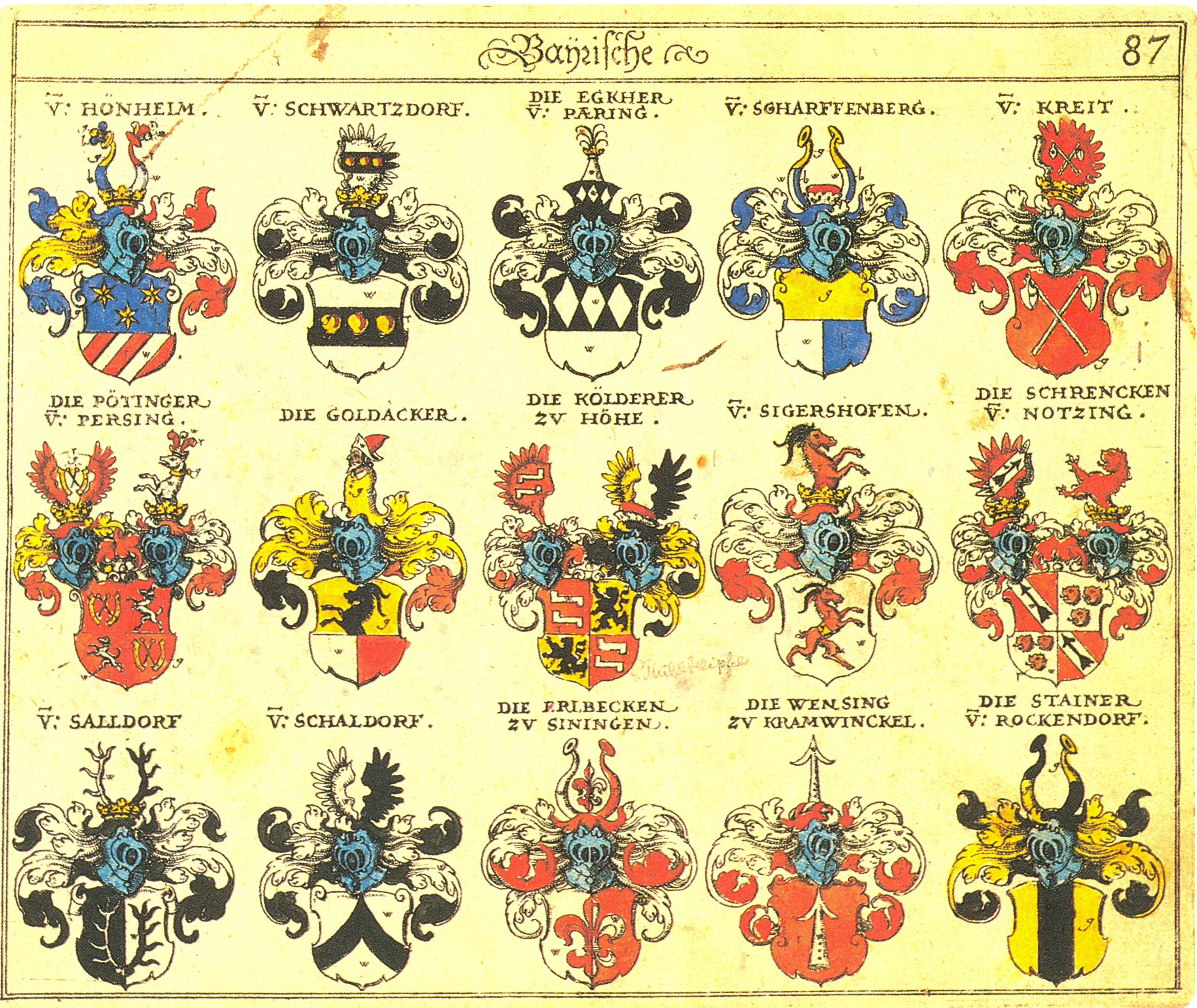 Johann Siebmacher: New Wappenbuch eingescannt aus: Horst Appuhn (Hrsg.), Johann Siebmachers Wappenbuch. Die bibliophilen Taschenbücher 538, 2. verb. Aufl , Dortmund 1989 Bayerische Blatt 87